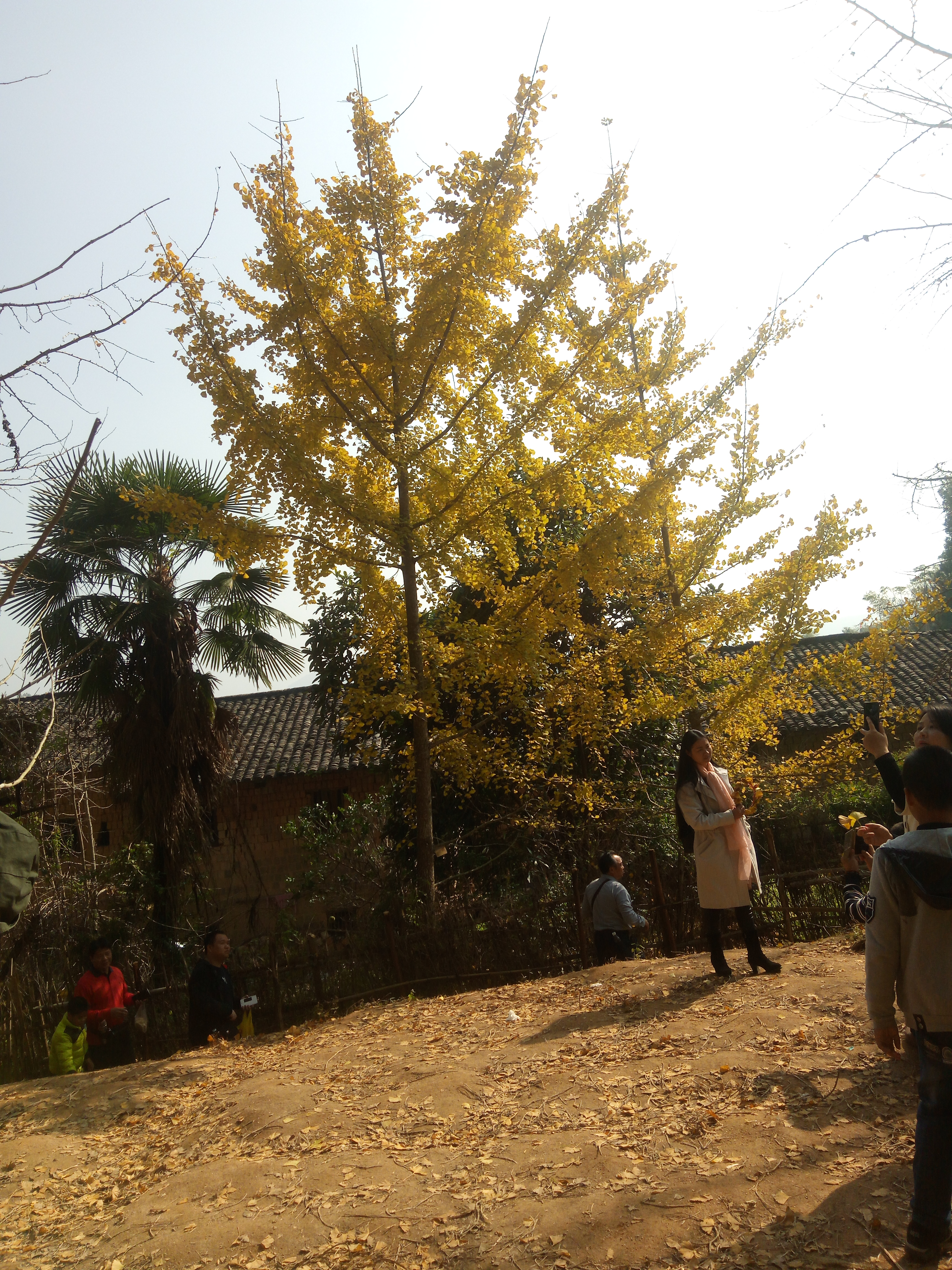 南雄市坪田银杏叶